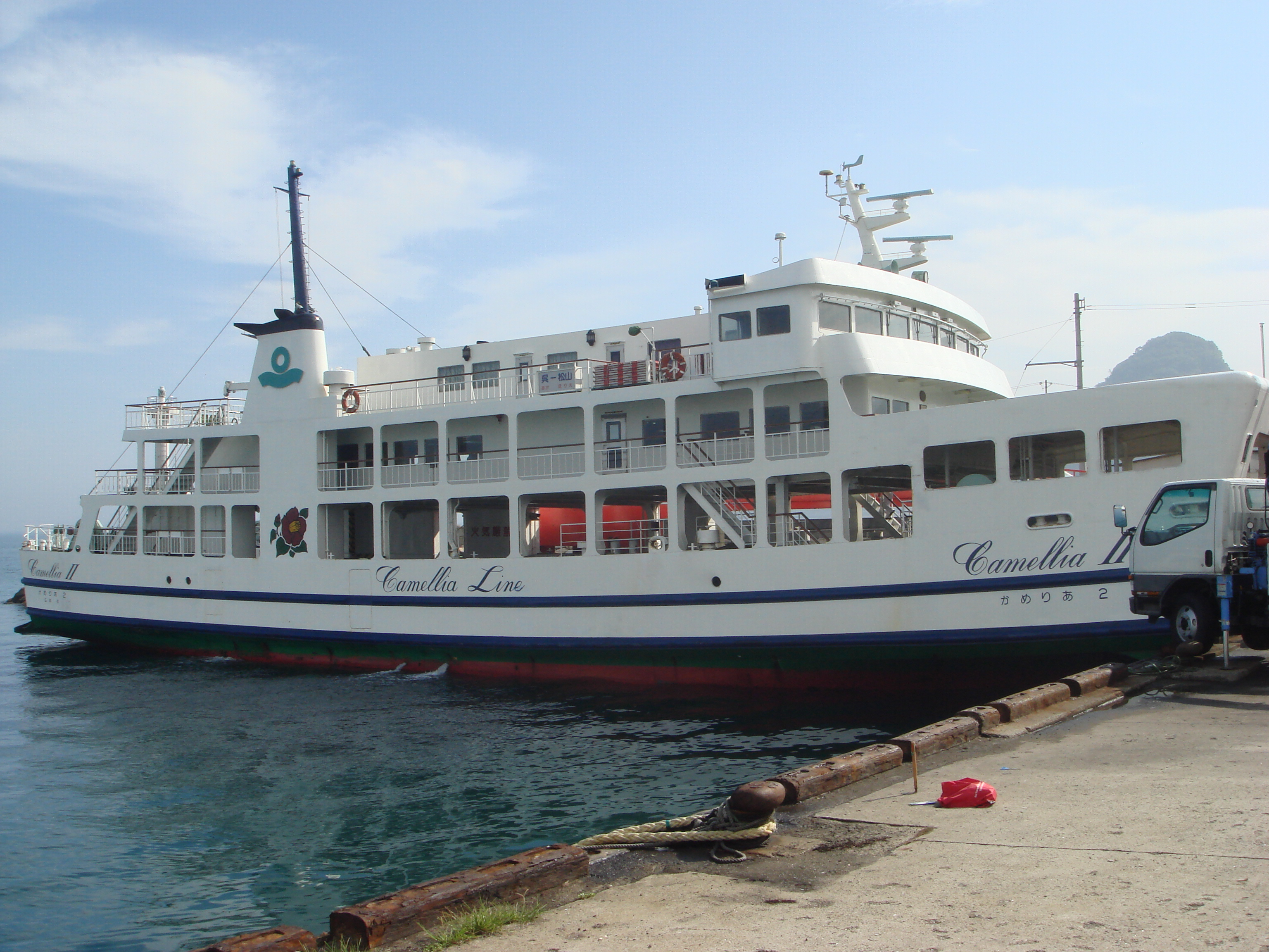 堀江港に停泊している呉・松山フェリー